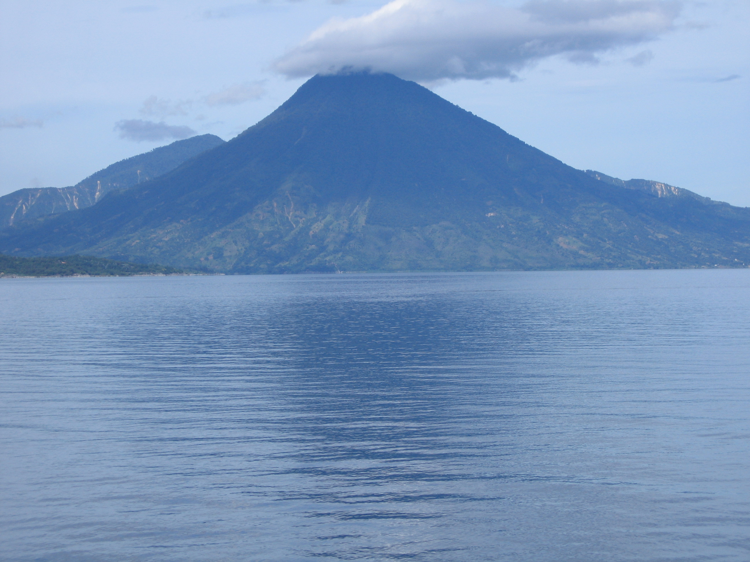 Atitlan lake (Guatemala), Toliman volcano, August 2006